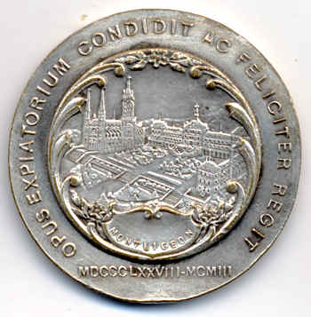 Médaille du 25ème anniversaire de la Basilique de Montligeon